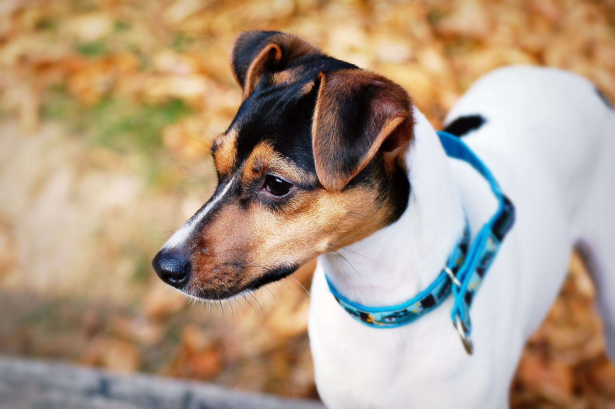 terrier brazylijski głowa